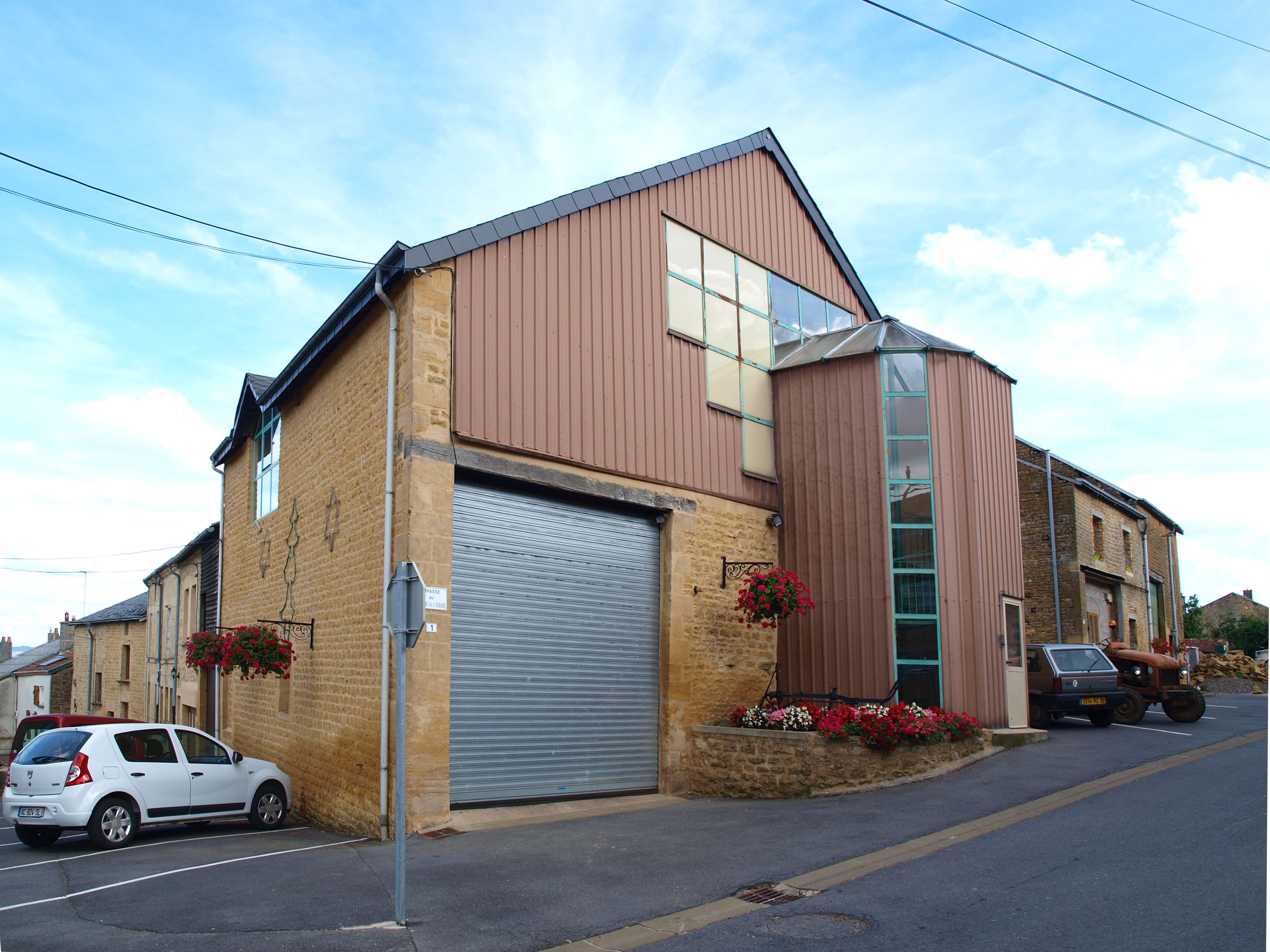 Saint-Marceau (Ardennes, France) ; mairie.